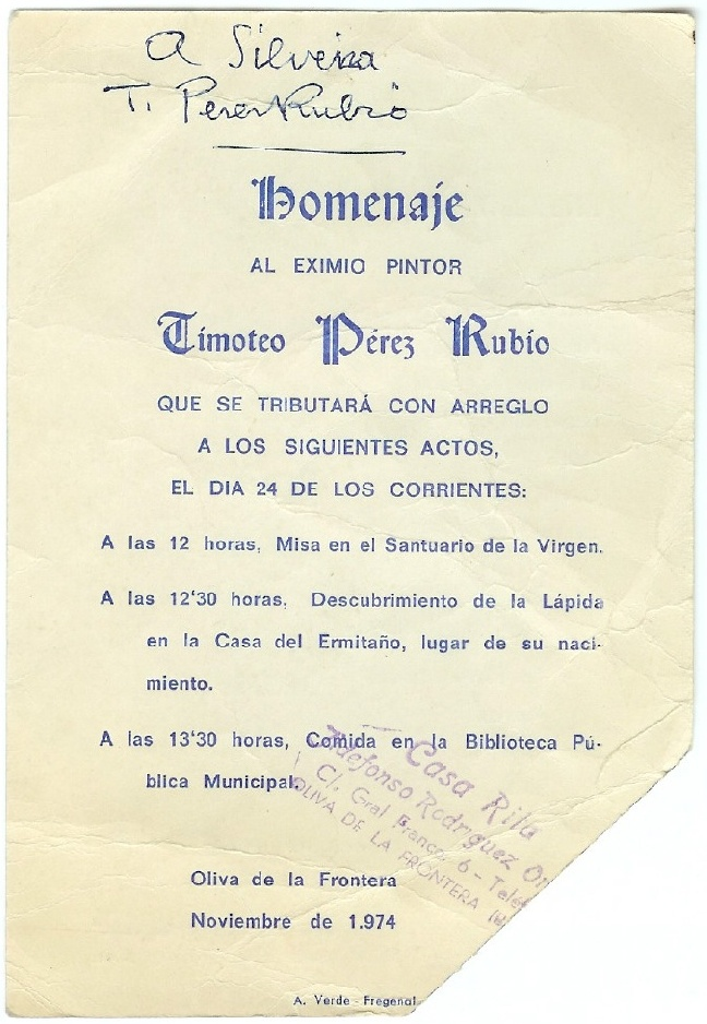 Tarjeta de invitación al homenaje a Timoteo Pérez Rubio celebrado en Oliva de la Frontera (Badajoz) el 24 de noviembre de 1974. Timoteo Pérez Rubio (1896–1977) Alternative names Timoteo Pérez RubioDescription painterDate of birth/death 1896 / 24 January 1896 8 August 1977Location of birth/death Oliva de la Frontera Rio de JaneiroWork period1915-1977Work location Madrid, Río de JaneiroAuthority control : Q6147067 VIAF: 112463577 ISNI: 0000 0000 8409 8236 ULAN: 500037877 LCCN: n81046280 GND: 1057665088 WorldCat